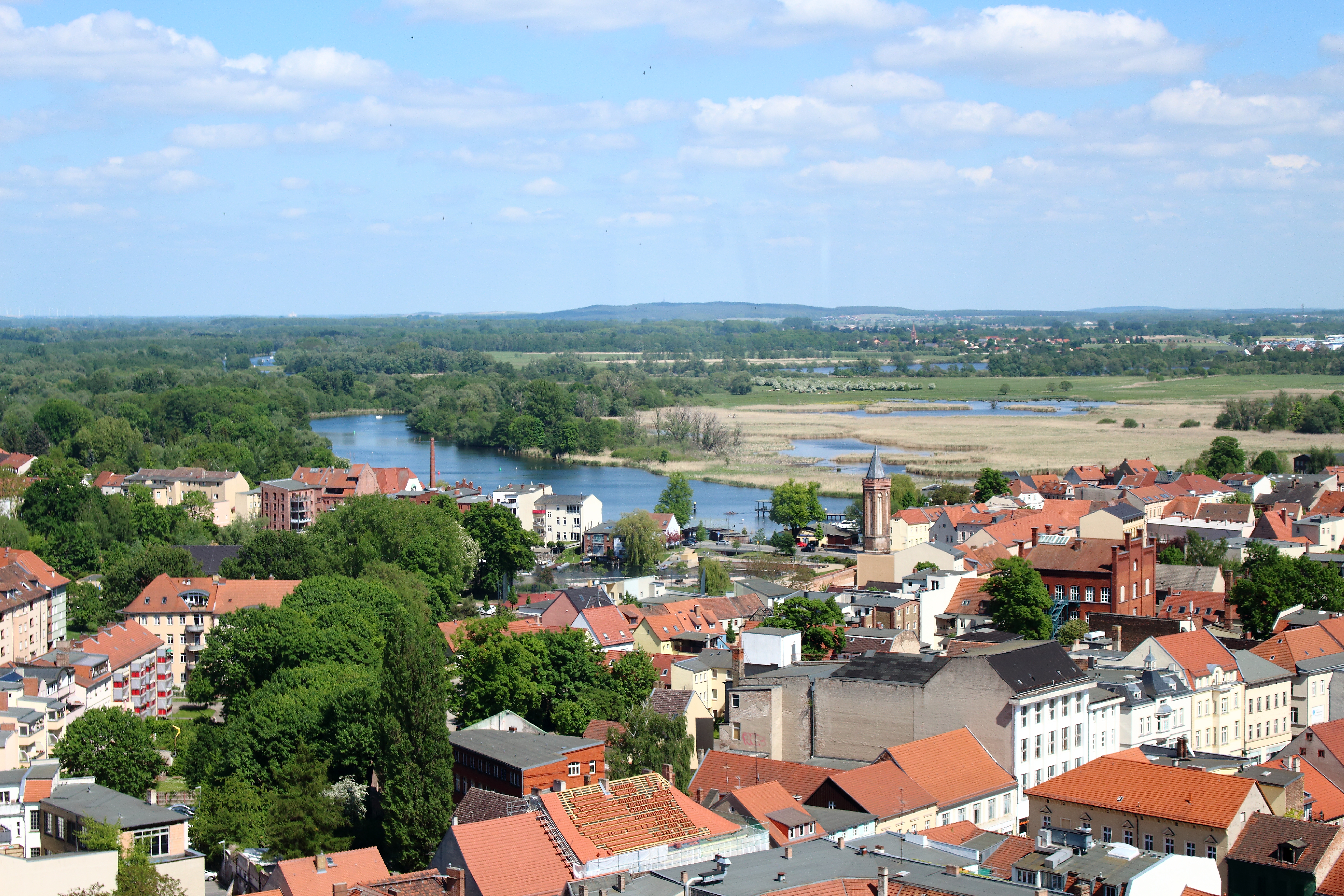 Brandenburg an der Havel vom Skyliner während der BUGA 2015